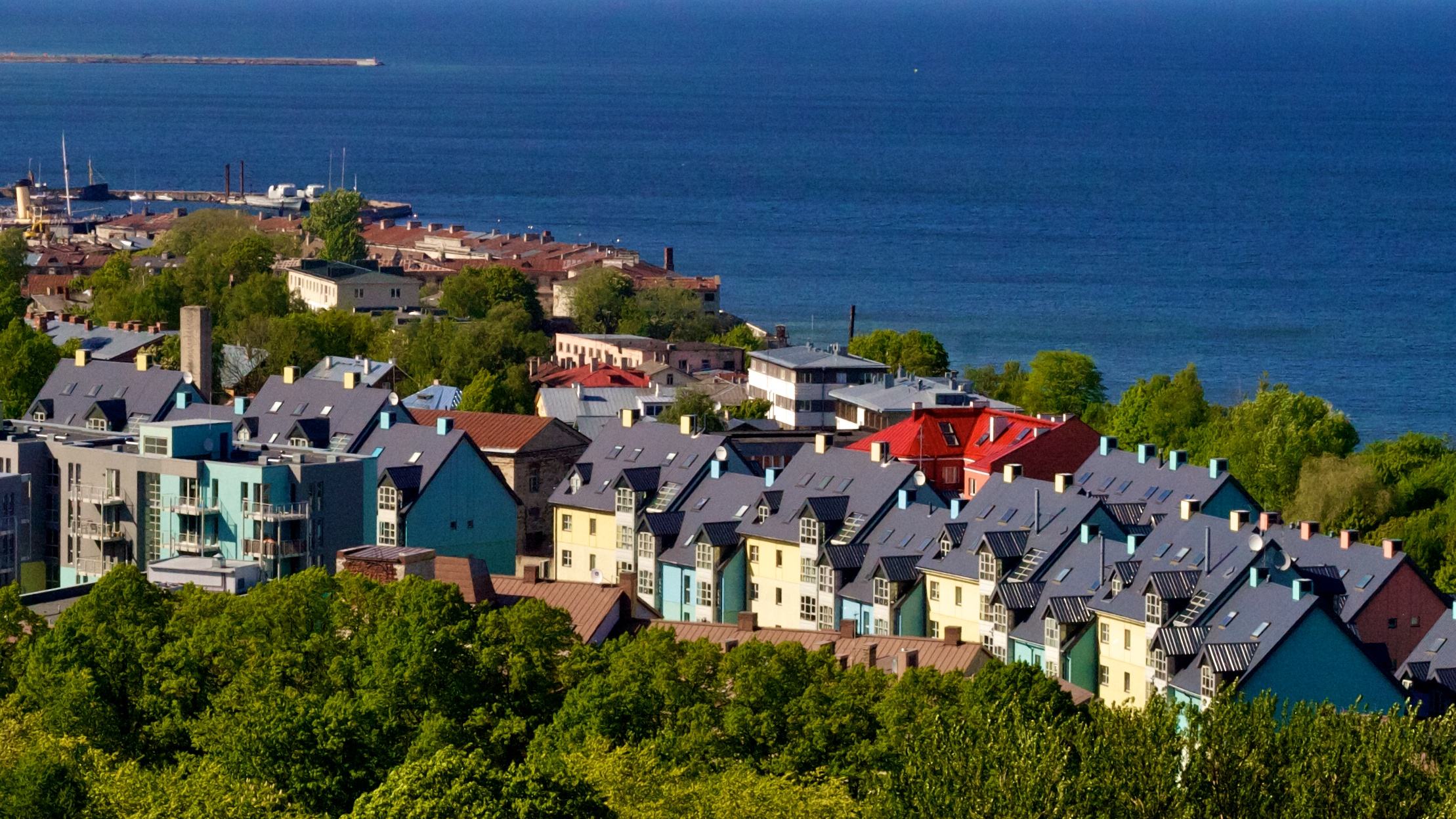 Ilmarise kvartal nähtuna Oleviste kiriku tornist.